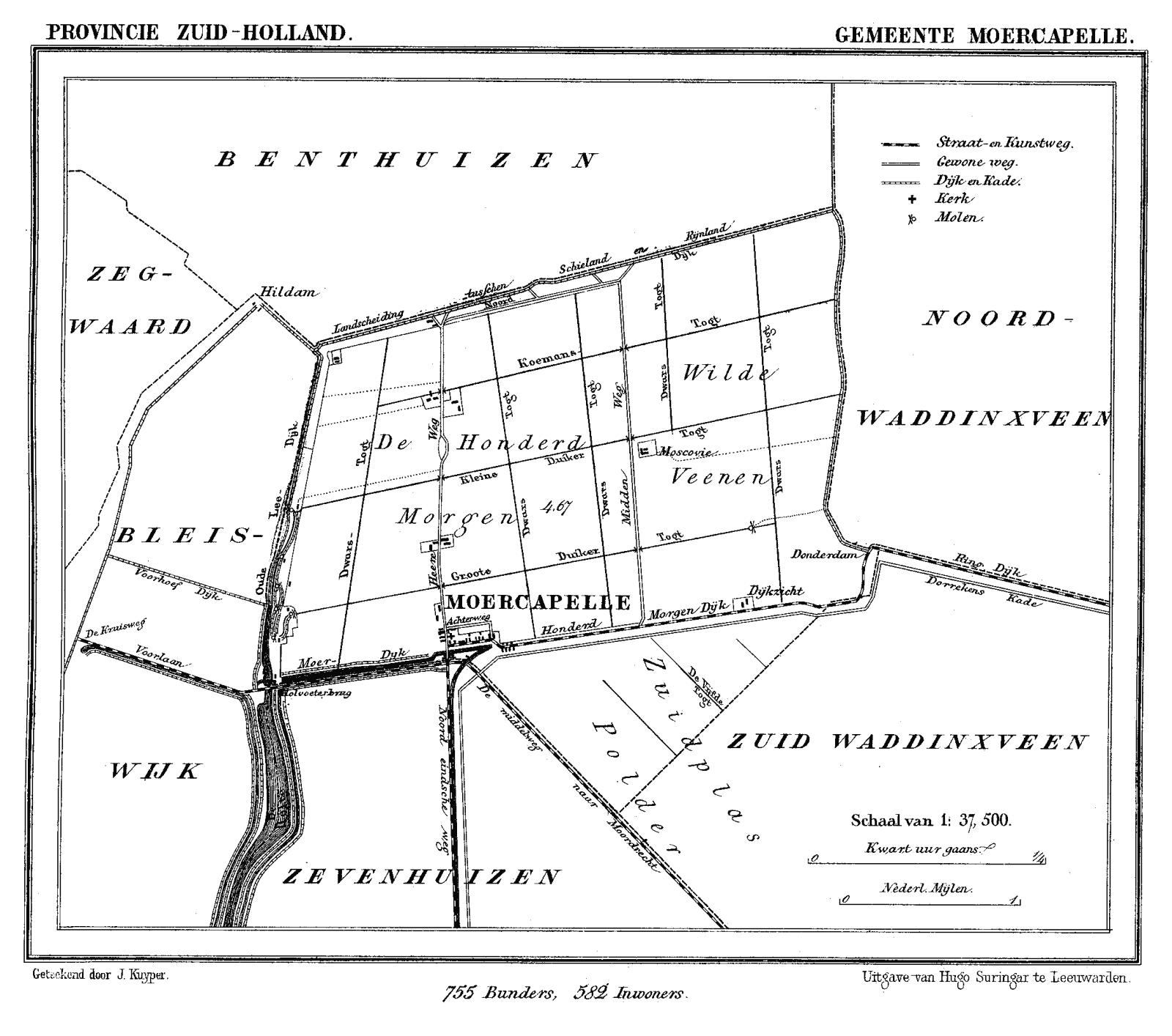 Kaart van Moerkapelle uit Gemeente Atlas van Nederland, J. Kuyper 1865-1870, Uitgave Hugo Suringar Leeuwarden.